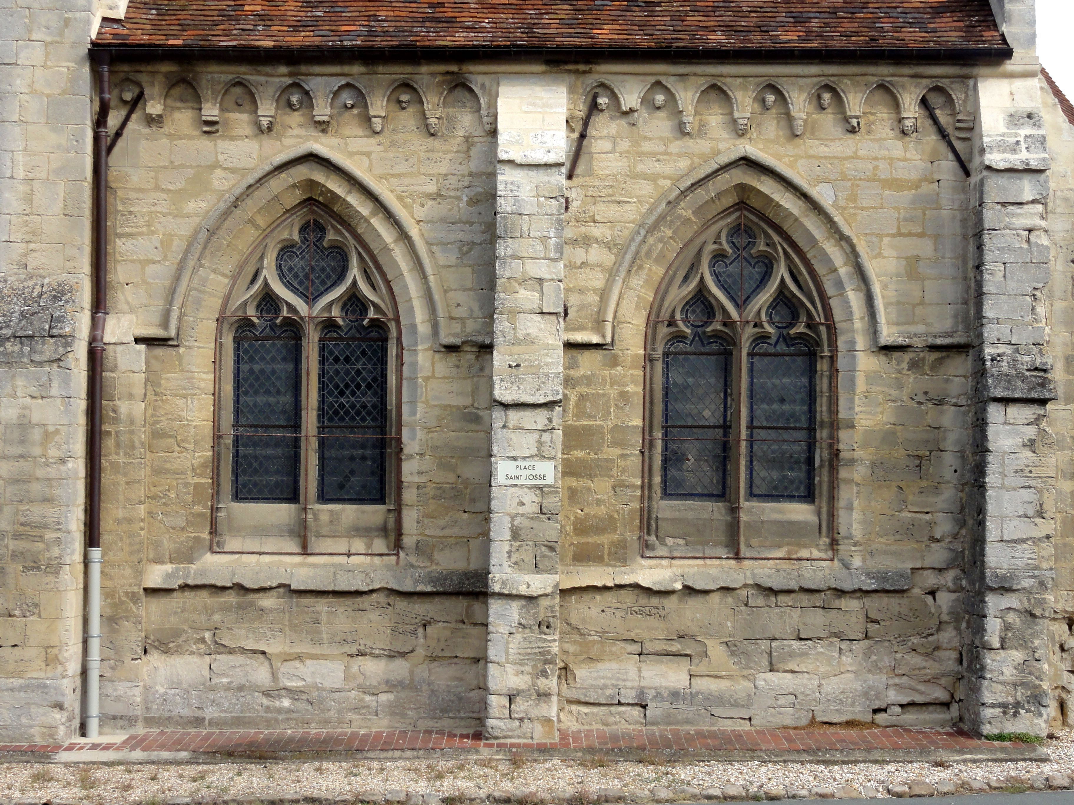 Collatéral sud du chœur.